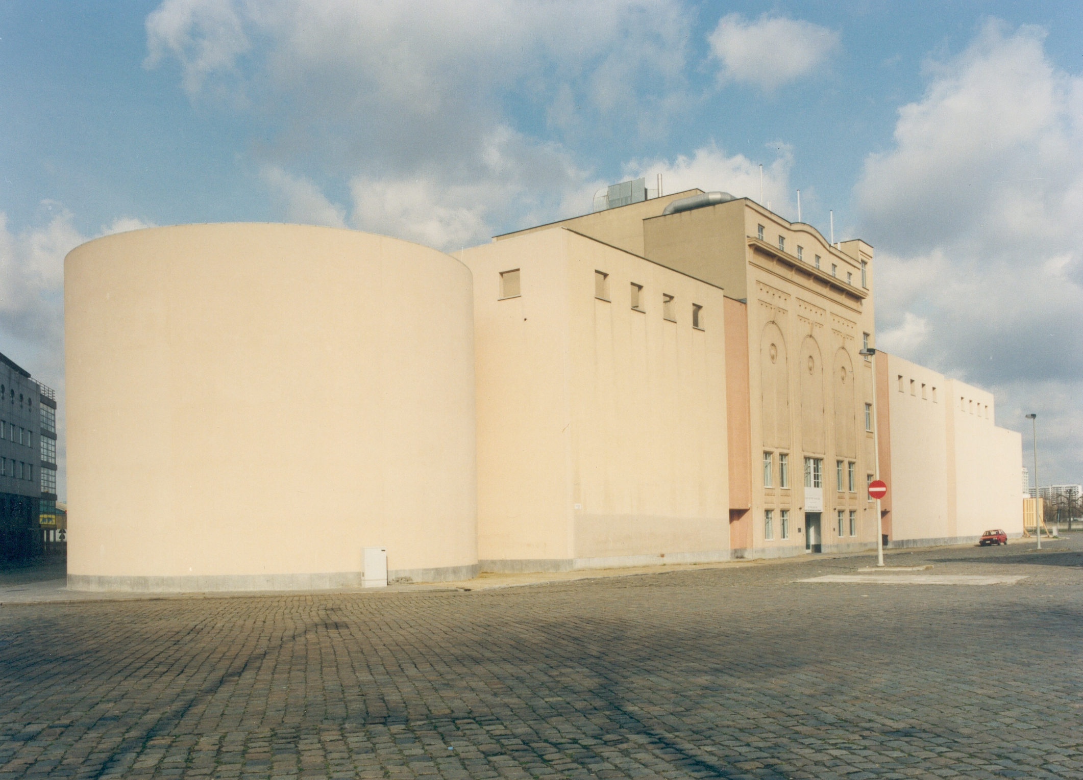 Afbeelding van het MUHKA in Antwerpen